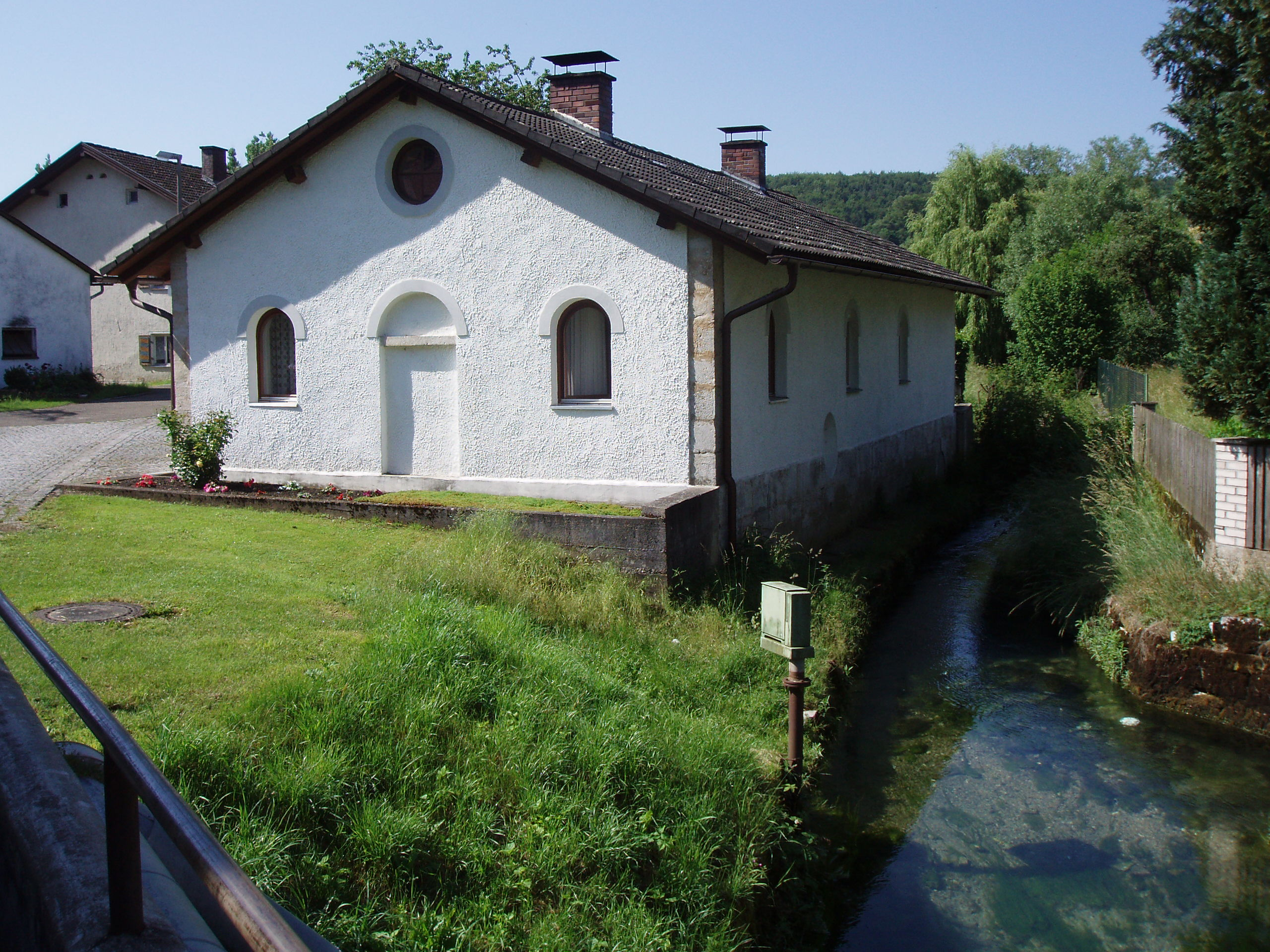 Obereichstätt Landkreis Eichstätt Klassizistischer Bau am Hüttenbach